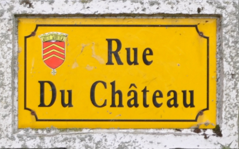 Lillers, Rue du Chateau